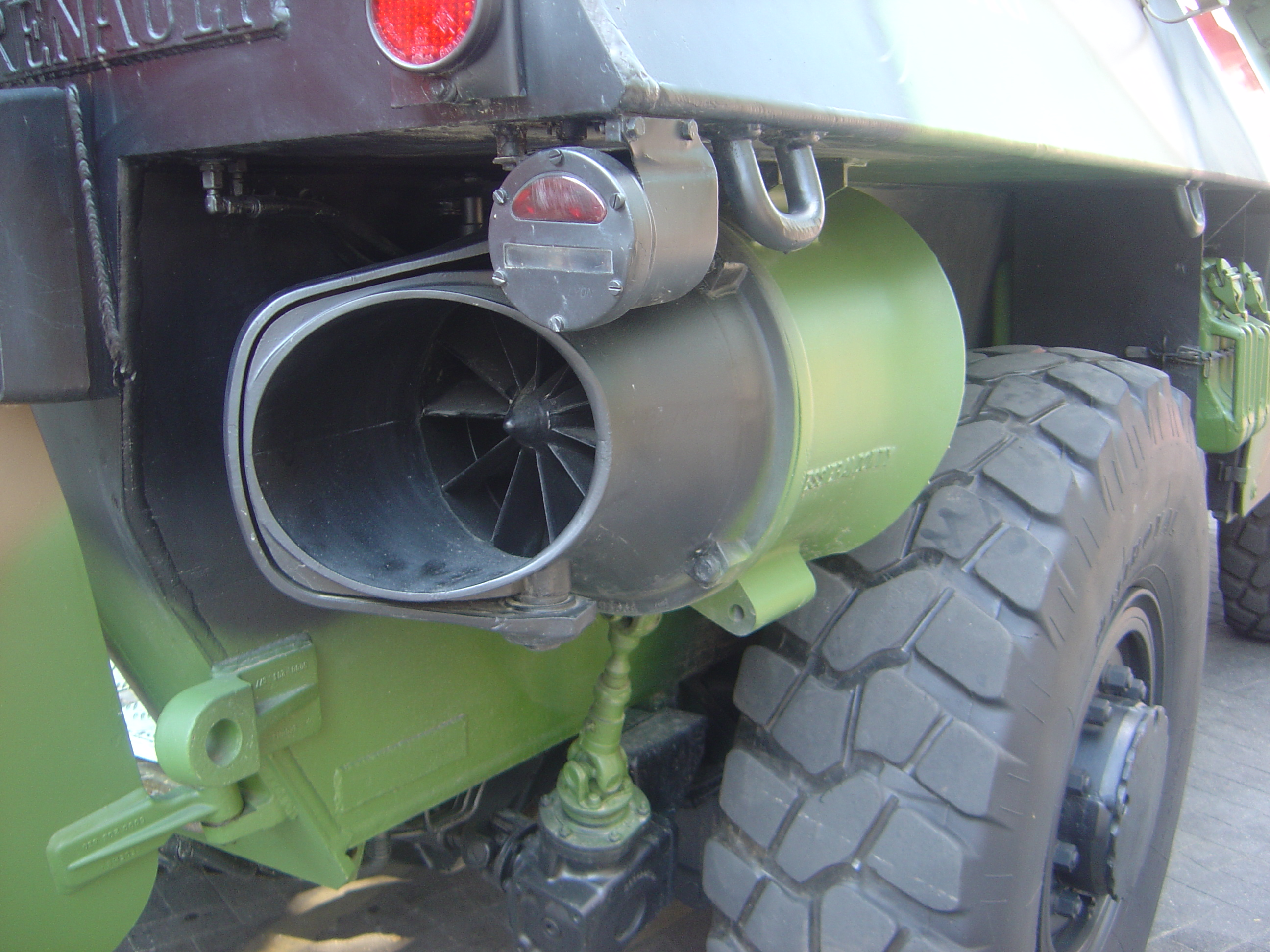 propeller on VAB armored personal carrier